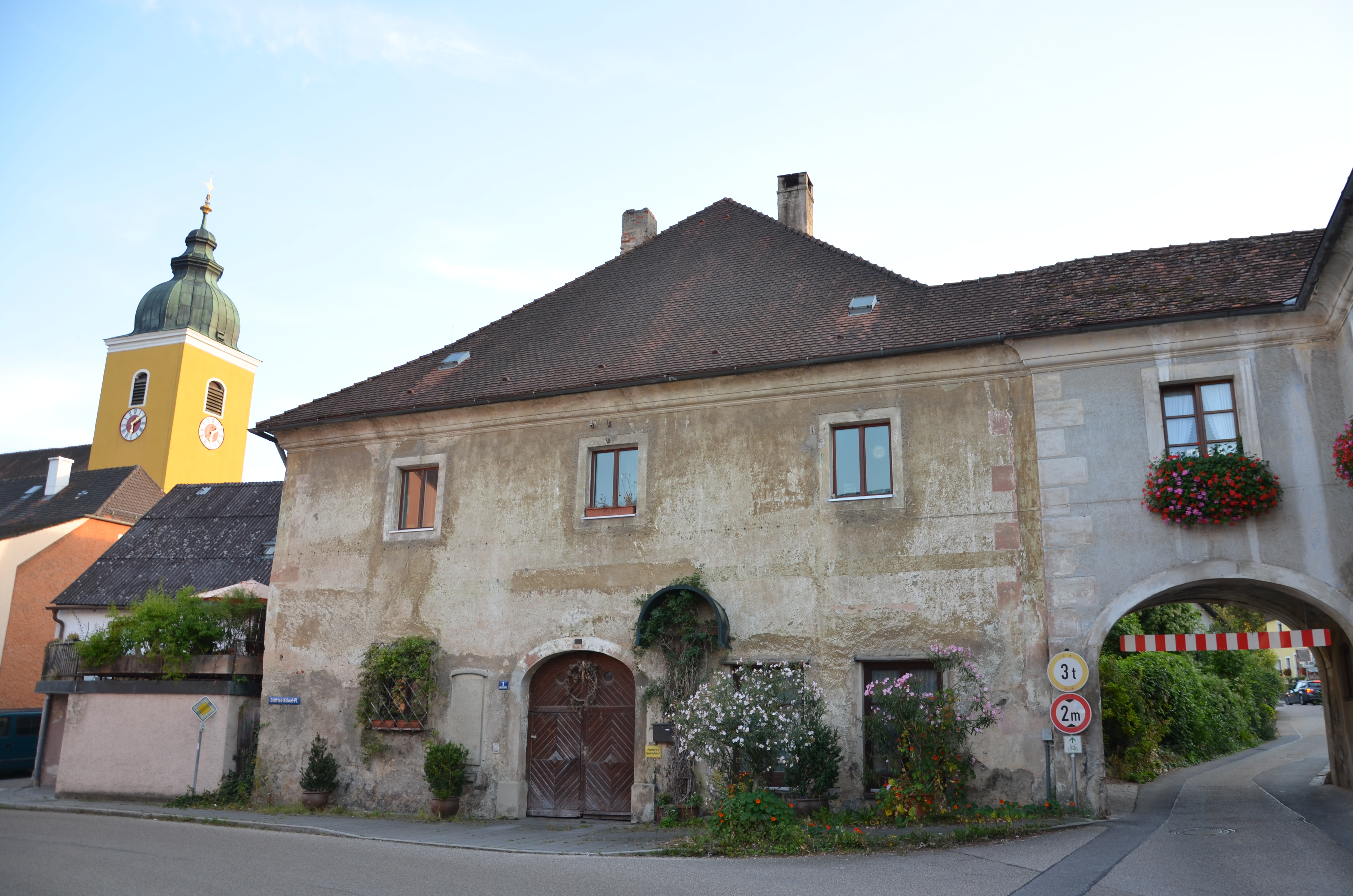 Geburtshaus von Gottfried Kölwel mit Pfarrkirche Beratzhausen im Hintergrund